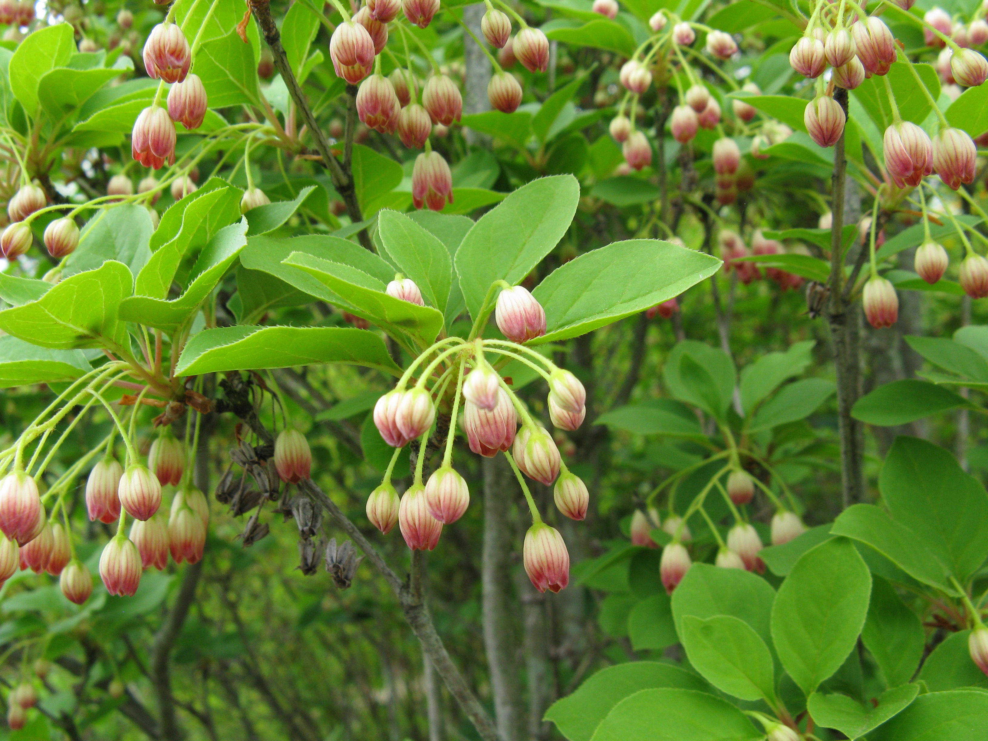 Enkianthus campanulatus